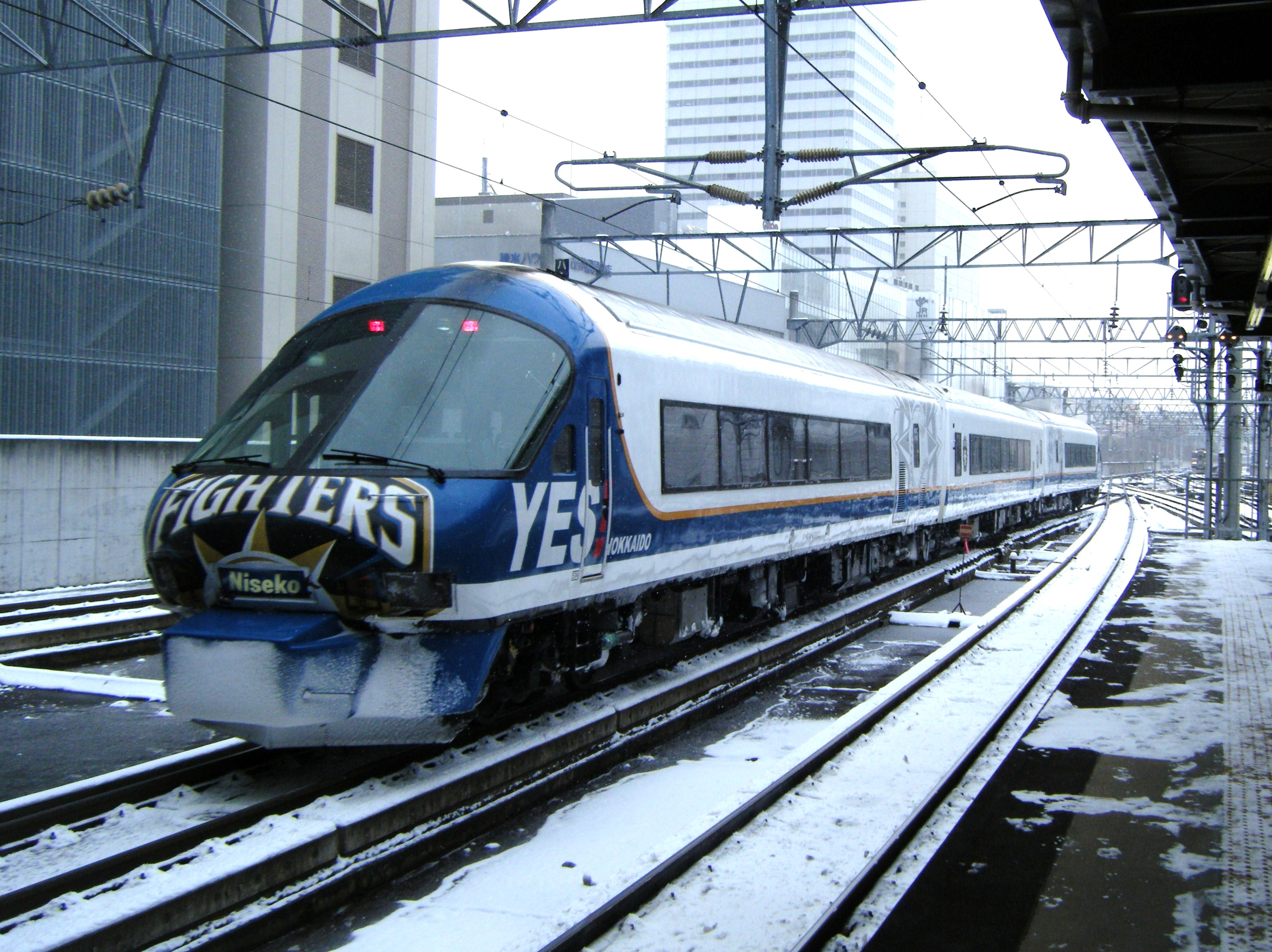 倶知安へ向かう「ニセコスキーエクスプレス」（JR北海道 函館本線 札幌駅にて）。 使用列車はニセコエクスプレス（キハ183系5000番台）。